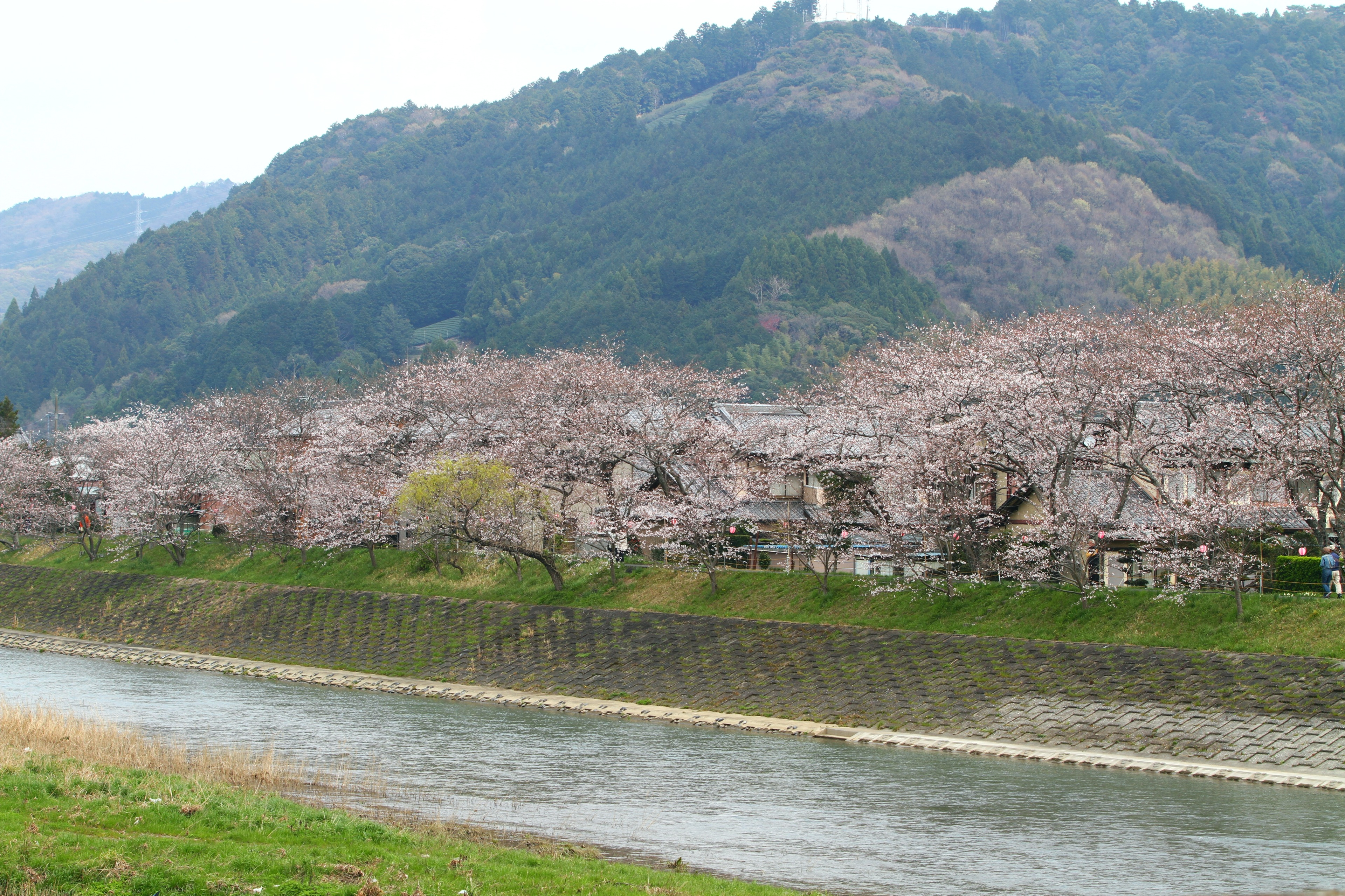 静岡県周智郡森町